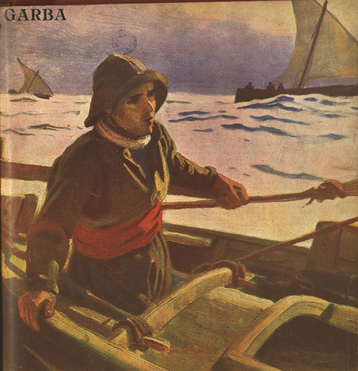 Garba (revista)